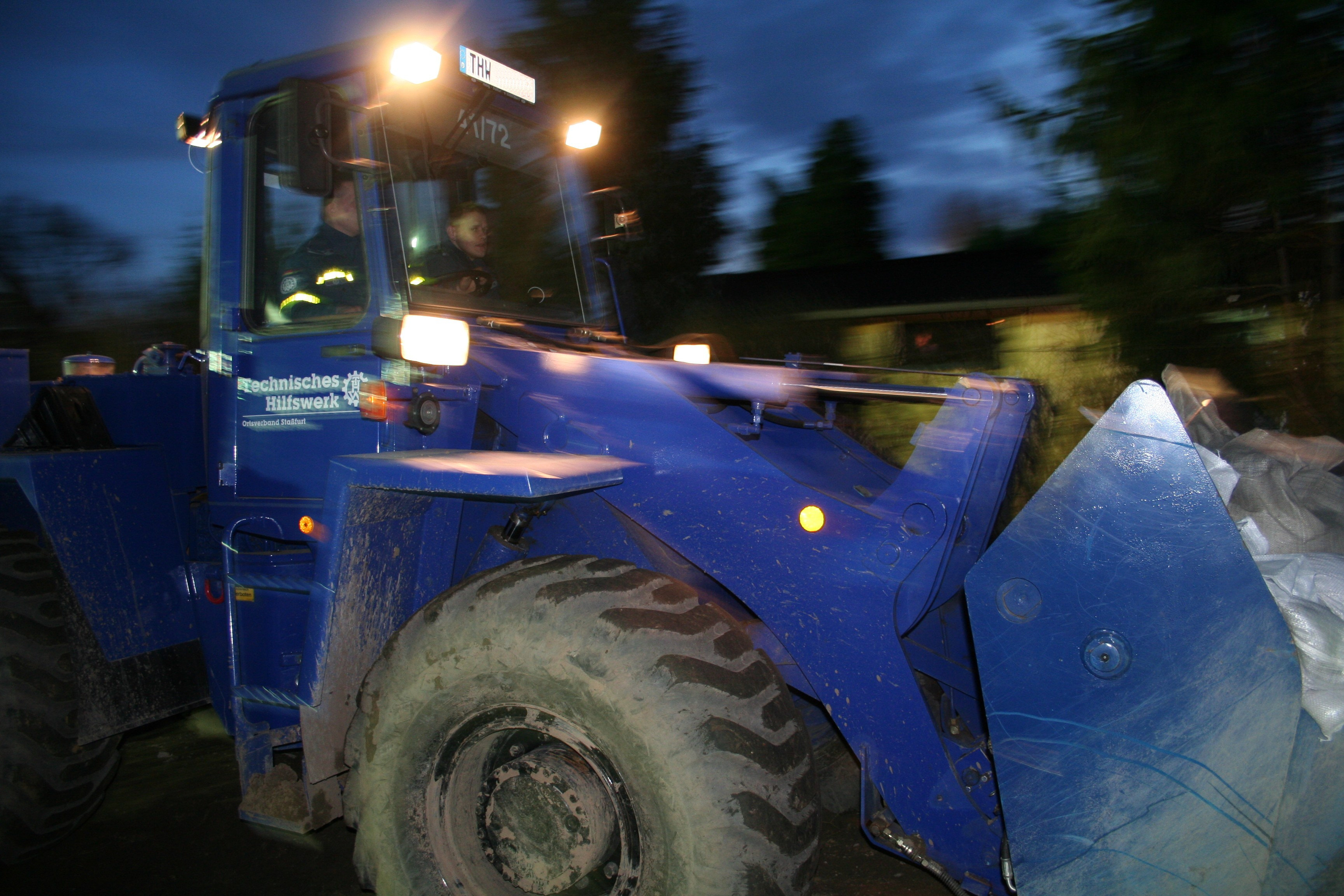 Radlader des THW Ortsverband Staßfurt